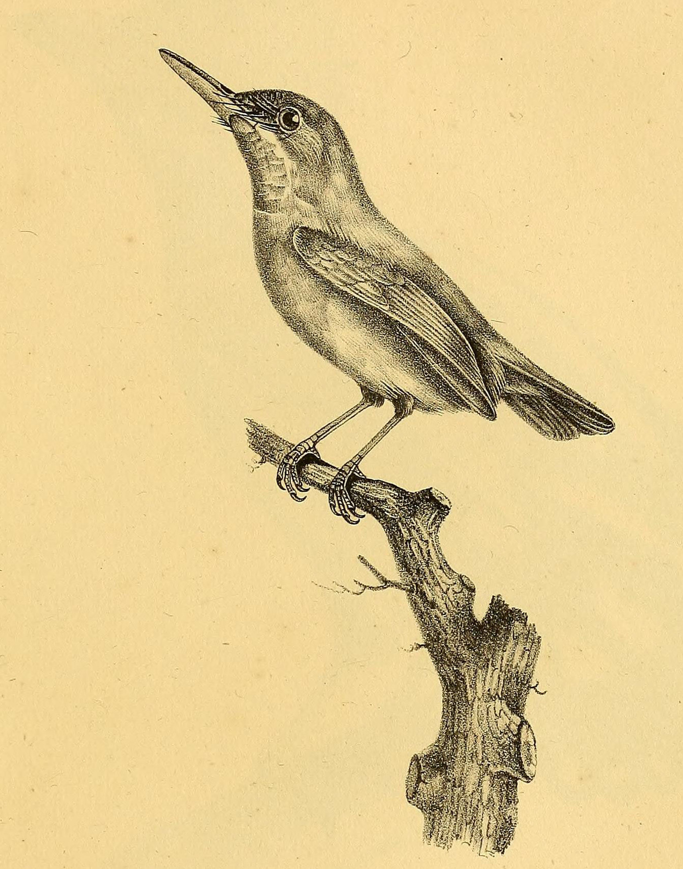 n. /2*. ( ^ ^- .- P.Ou-cùtrl «i/- /rA4.7 J,. i ,\rolt^.